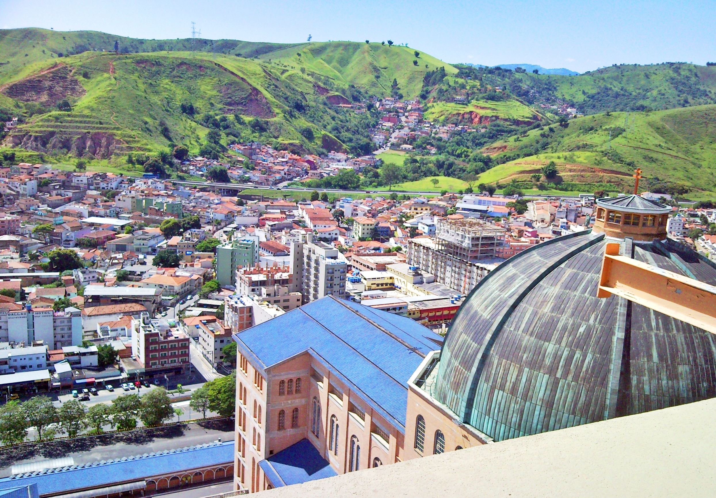 Vista da torre da Basílica de Aparecida com Vistas para o Bairro Santa Rita, tirada da torre da Basílica